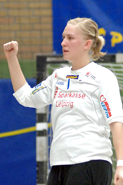 Portrait Foto Therese Bengtsson